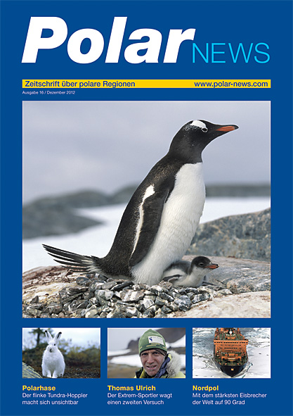 Cover der Dezember-Ausgabe 2012 des Magazins Polarnews